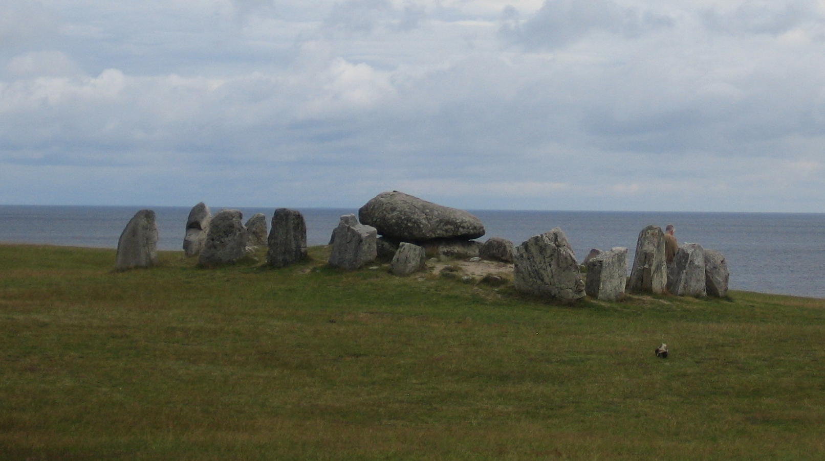 Stone age monument, Haväng, Sweden